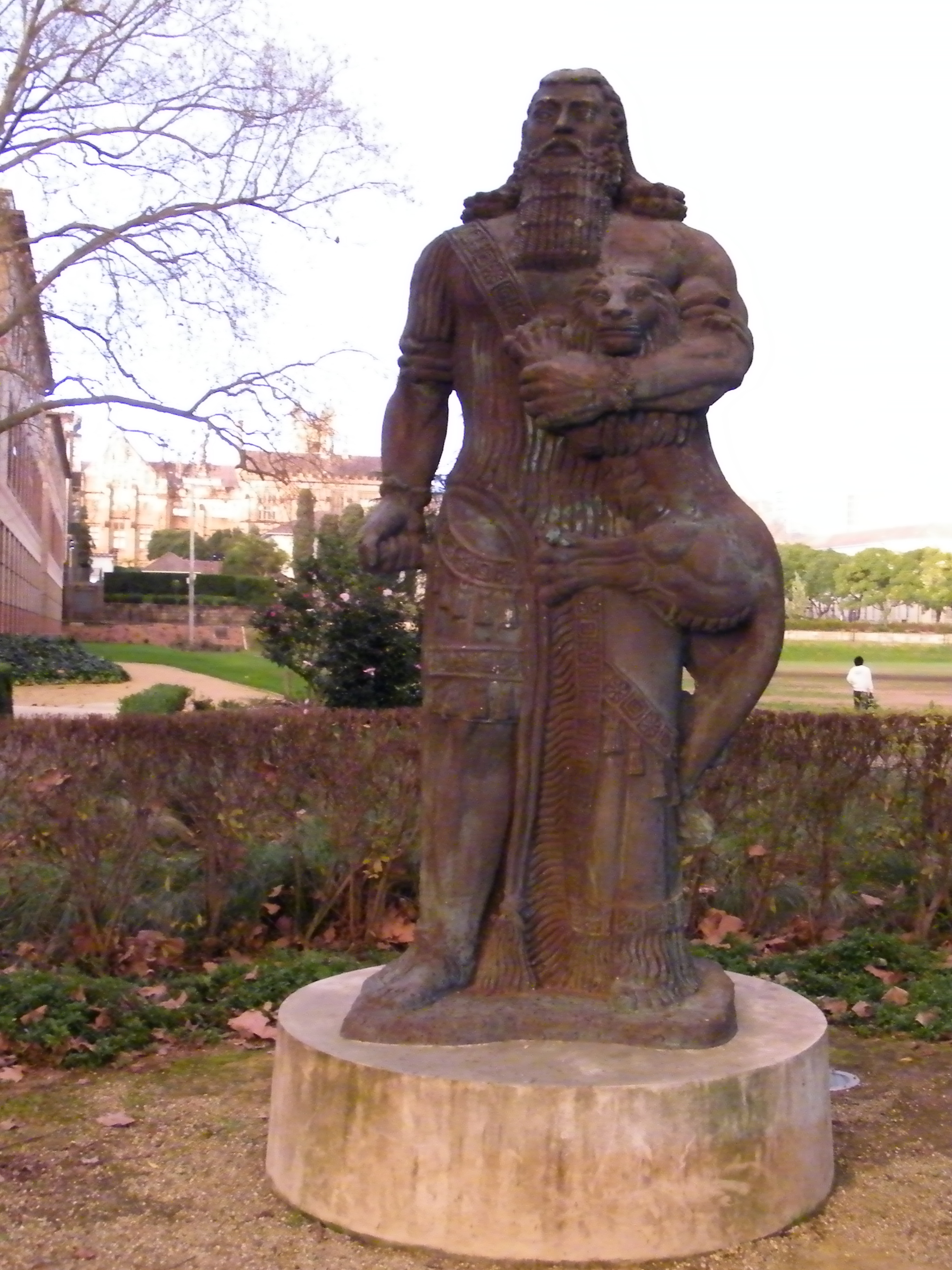 Gilgames szobra